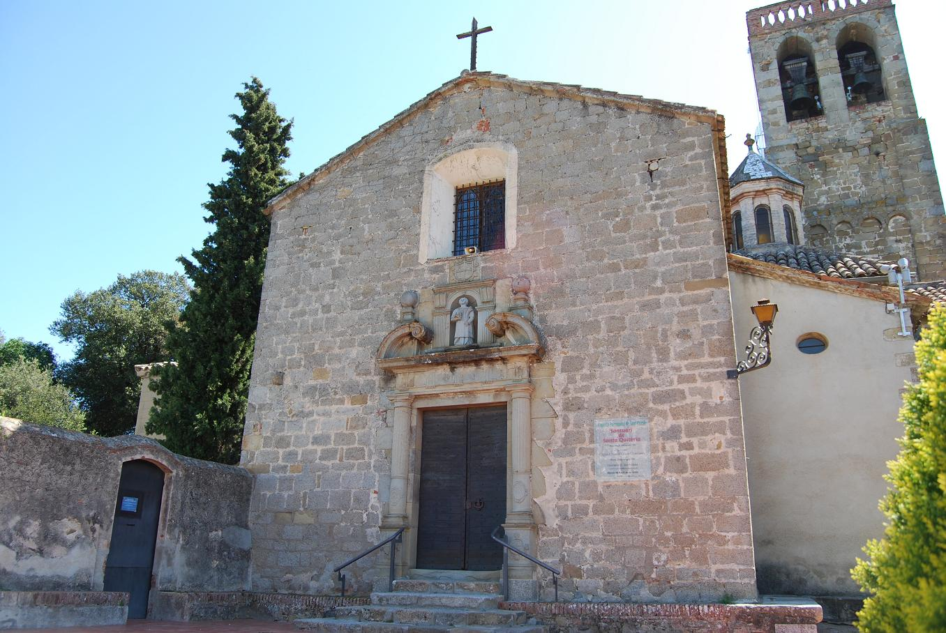 Vilanova del Vallès: Sant Esteve de Vilanova del Vallès, coneguda també per Santuari de Santa Quitèria. Els seus vestigis es remunten al segle X.